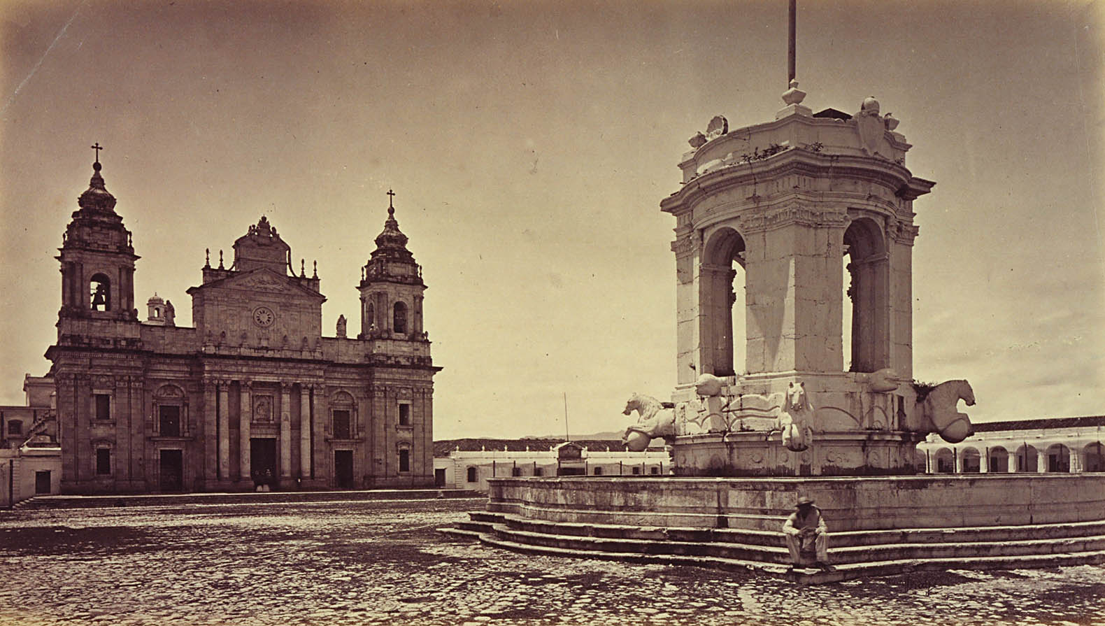 Plaza de Armas de Guatemala en la década de 1870.